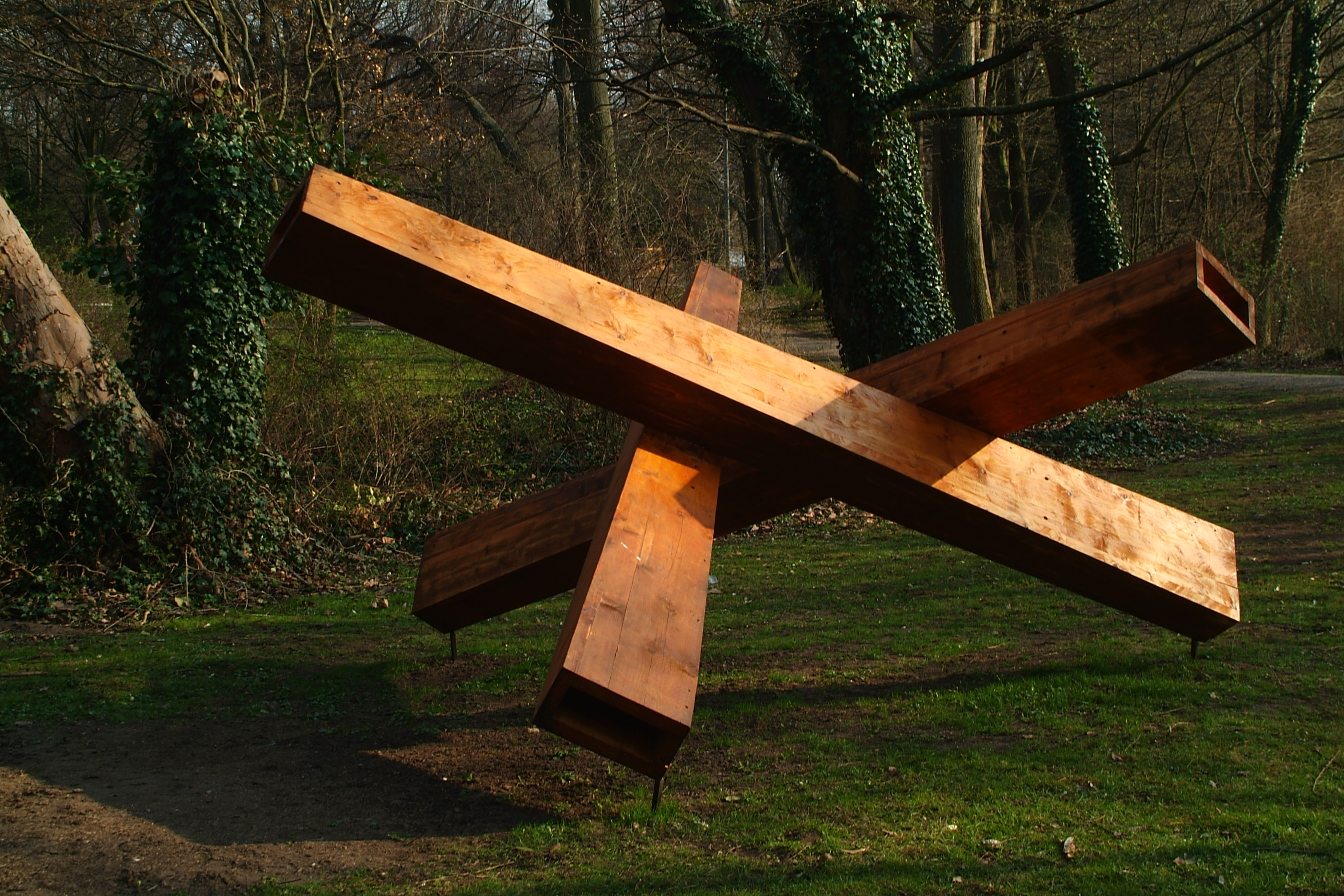 Burkard Bumann-Döres: ohne Titel, 2012 auf der Ausstellung flusswärts 2 in Hannover 2012/13